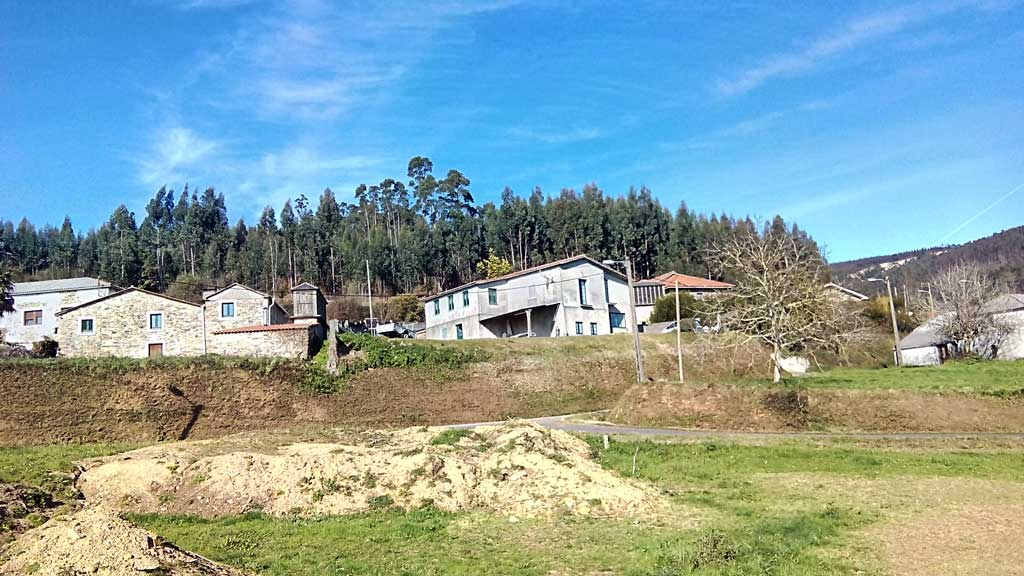 Vista de Placente, Sedes.